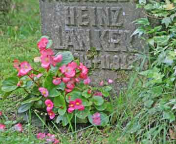 Die Grabstätte des Schauspielers Heinz Lanker auf dem Freidhof Ohlsdorf.